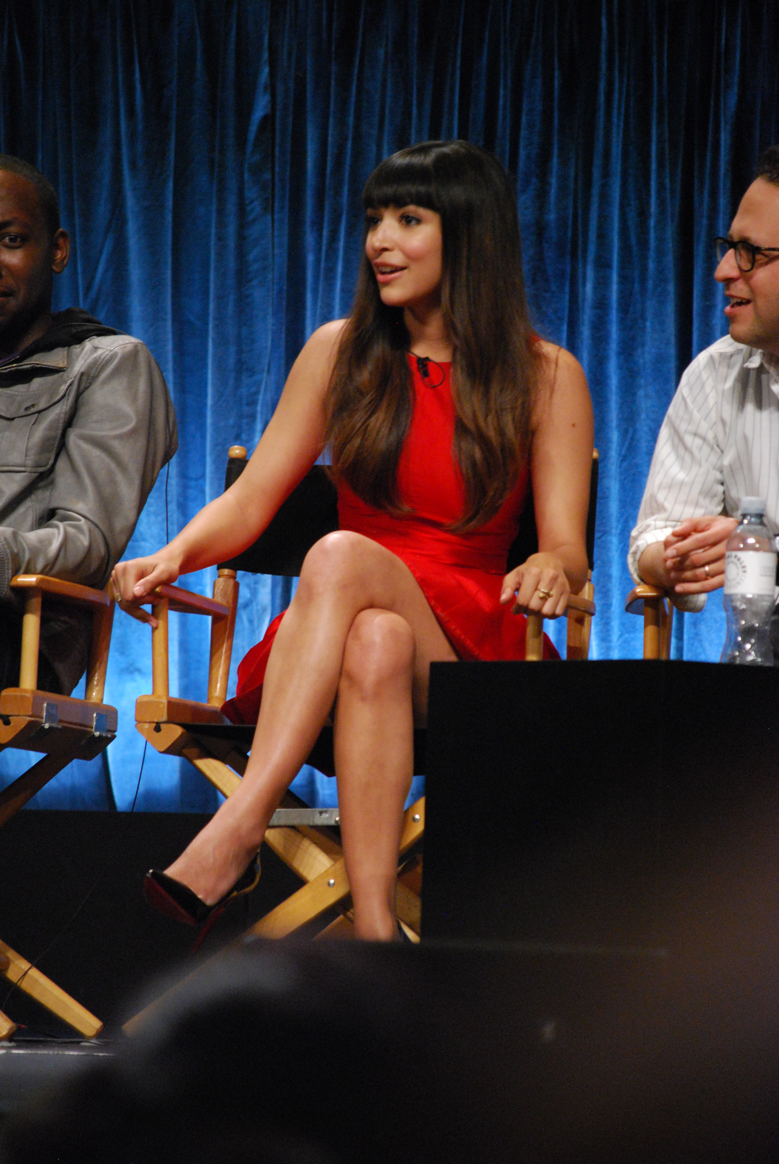 Hannah Simone